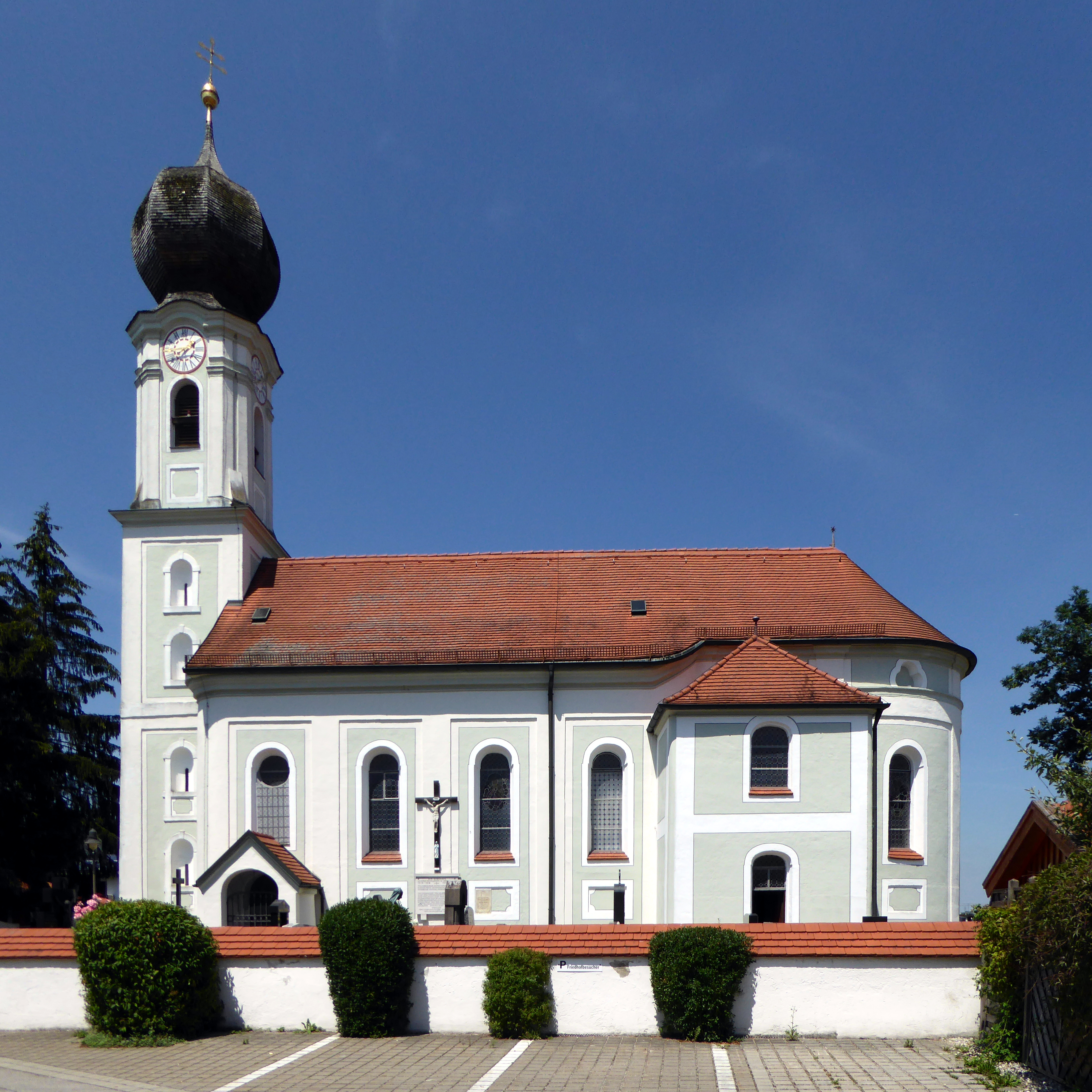 Boarisch: De Stephanskiach in Landsham in da Gmoa Pliening.